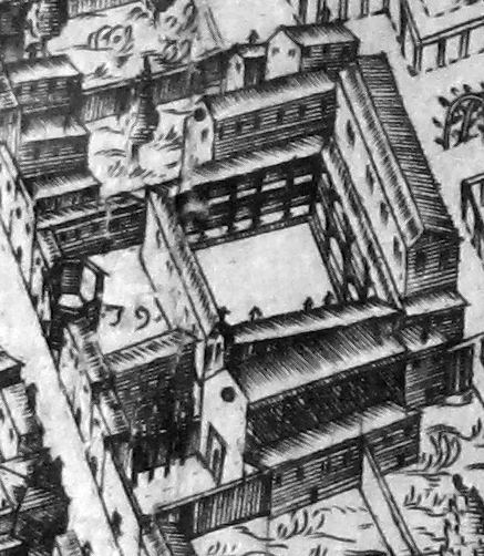 Pianta del buonsignori, dettaglio 039 cestello prioria (santa maria maddalena de' pazzi)